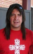 El ex-portero de fútbol "Mono" Burgos